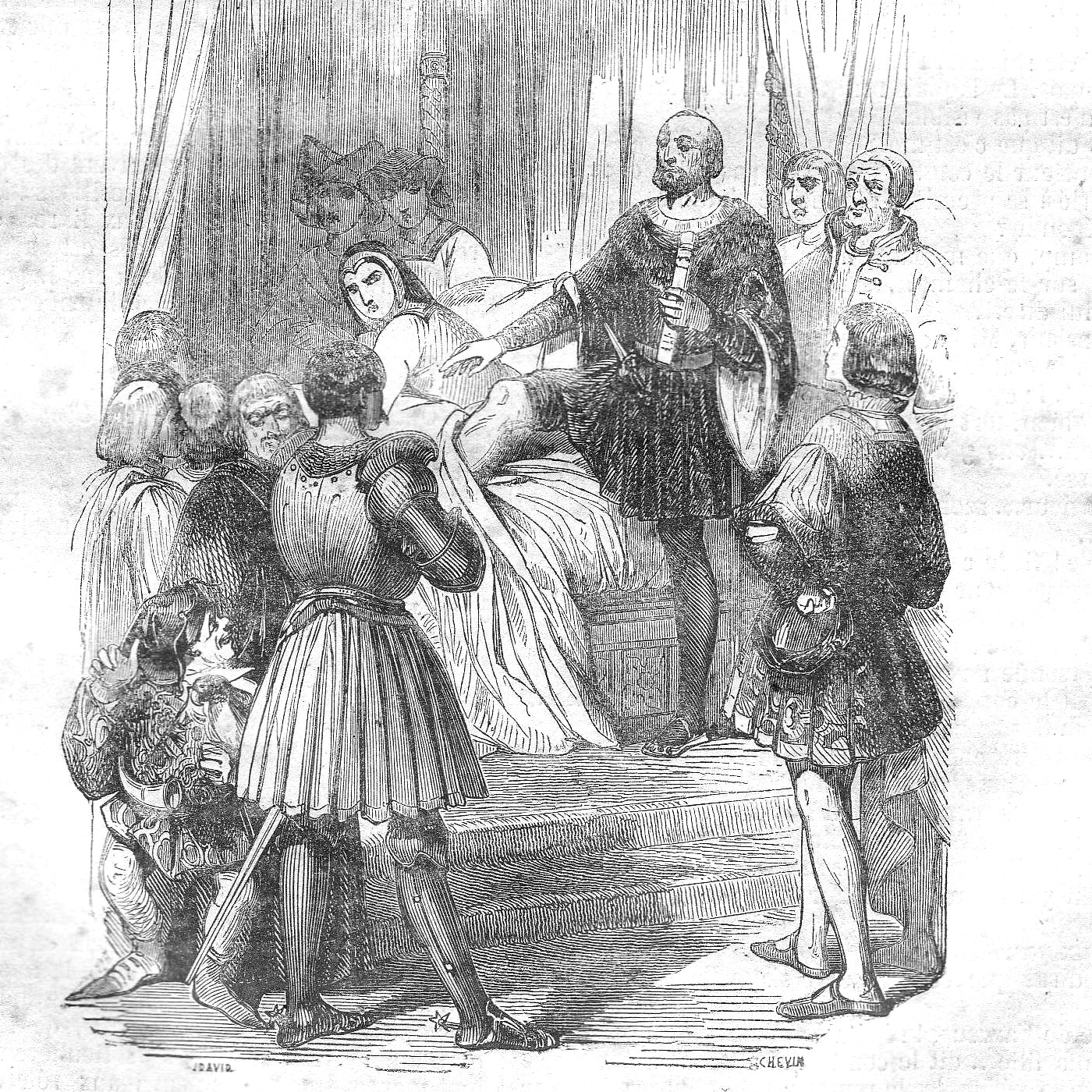 Droit de Cuissage - Mariage par procuration entre Anne de Bretagne et Maximilien 1er